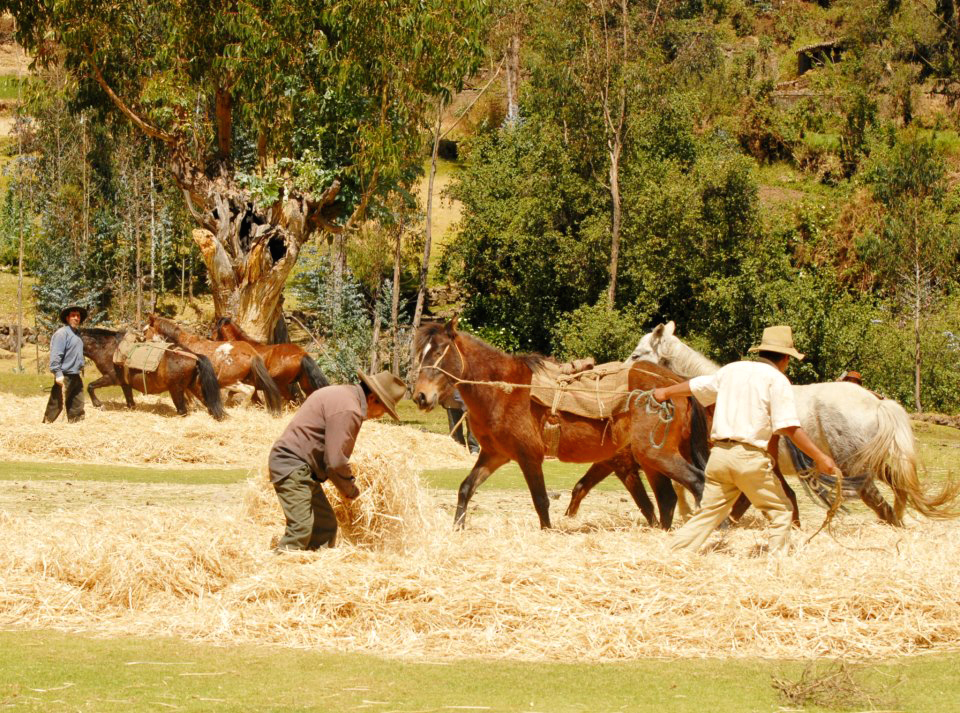 Consiste en separar el grano de la paja.